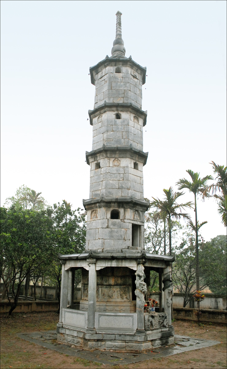 Le stupa funéraire de Chuyet Cong. La pagode But Thap (Ninh-Phuc) s'élève dans le village de Dinh To, à 30 Km au sud-est de Hanoi. Elle a été érigée en 1646-1647 par le moine chinois Minh Hanh. Elle compte plusieurs bâtiments dont quatre sont entourés d'un mur d'enceinte. Les bâtiments sont reliés par des galeries.